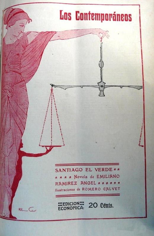 Portada de Santiago el verde.